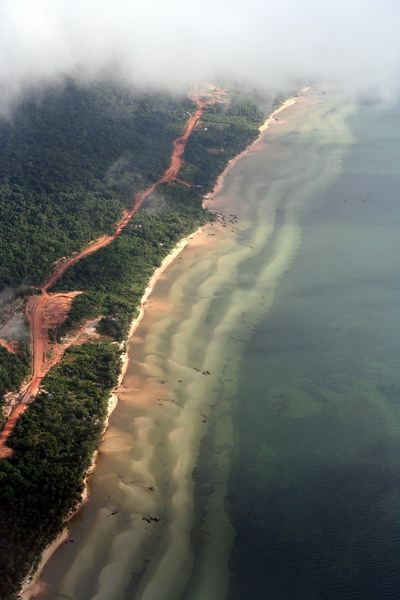 Le littoral de Phu Quoc